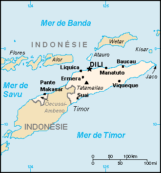 Carte du Timor oriental (wp-FR), adaptée de la carte originale en anglais disponible dans le CIA World Factbook (wp-FR).